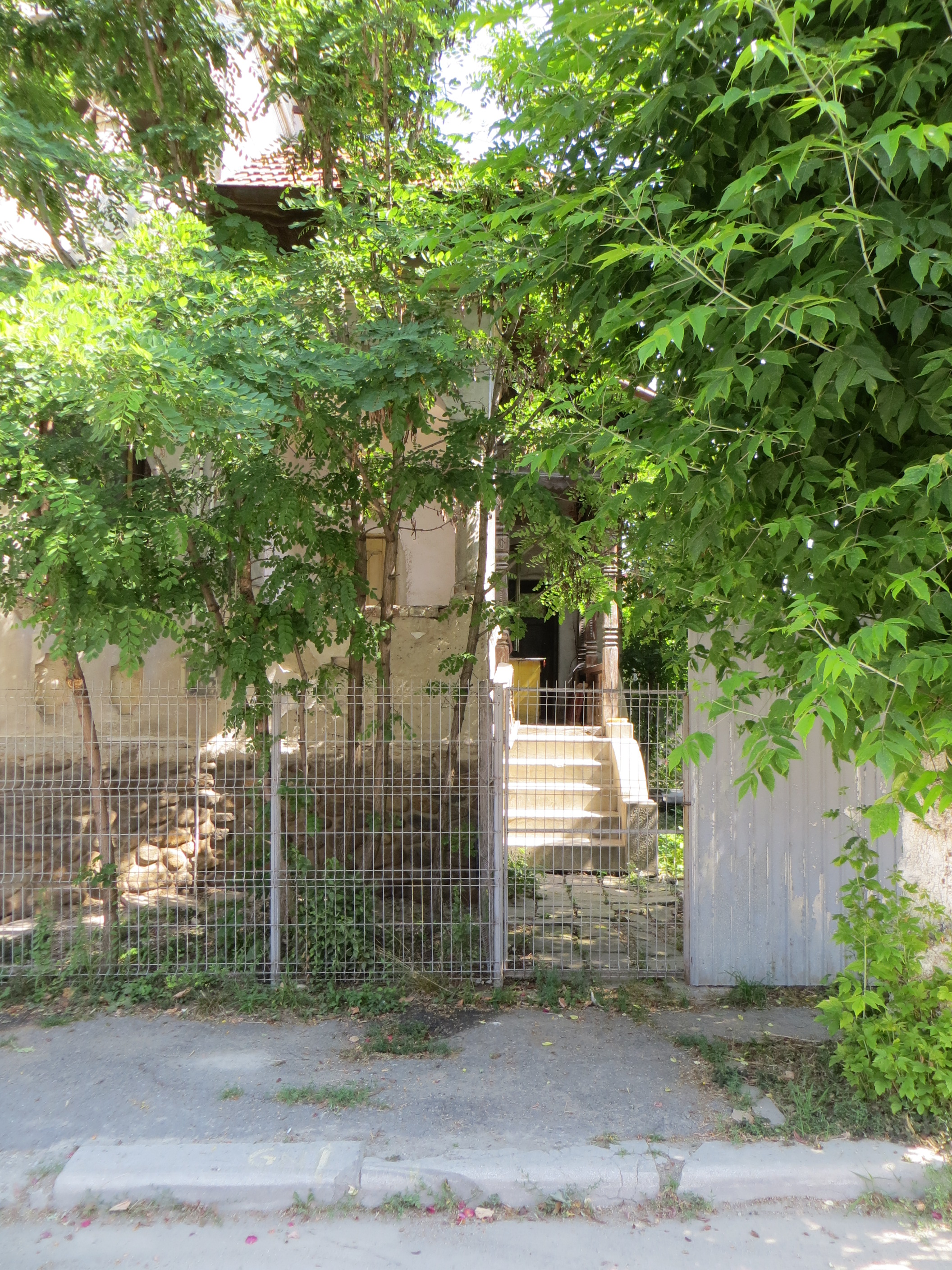 Casa Opriș